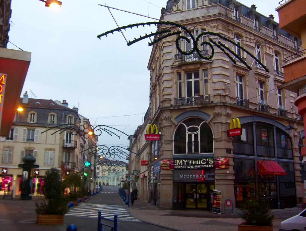 Rue Léopold-Bourg.